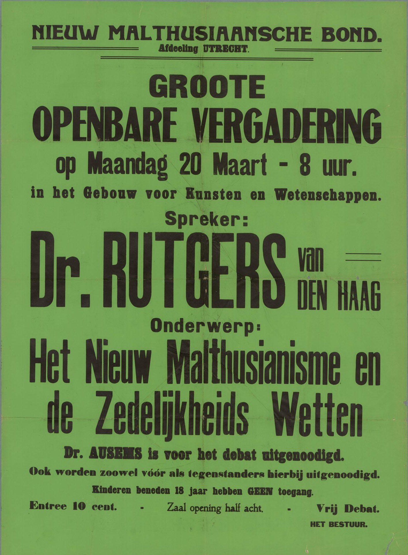 Affiche: Groote openbare vergadering. Nieuw Malthusiaanse Bond. Spreker: Rutgers, J., Aussems, A.W.